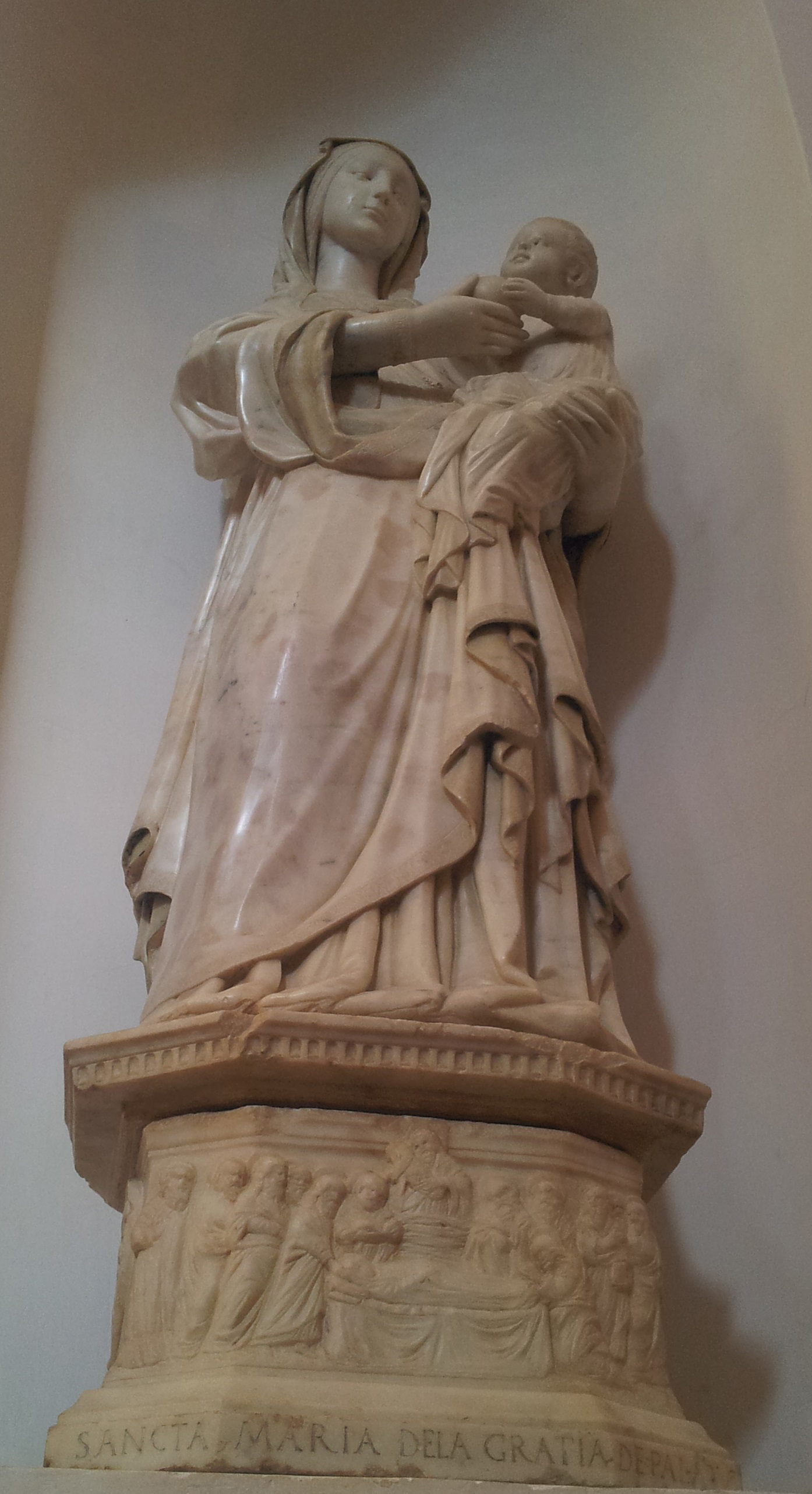 Madonna delle Grazie a Palazzolo Acreide di Francesco Laurana scolpita fra il 1471 e il 1472 per commissione del barone del paese